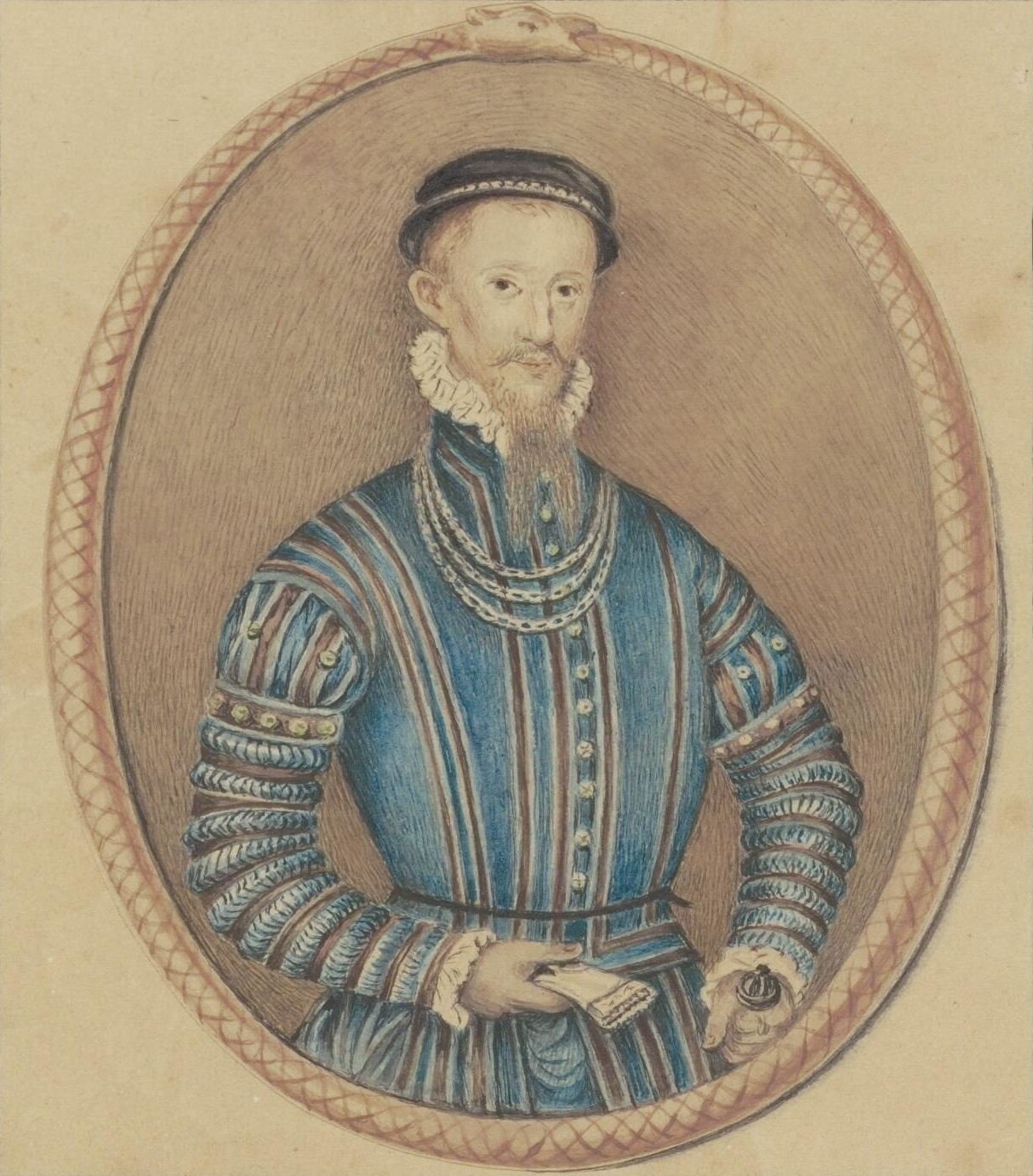 Doeke fan Martena (1530-1605), bysnien